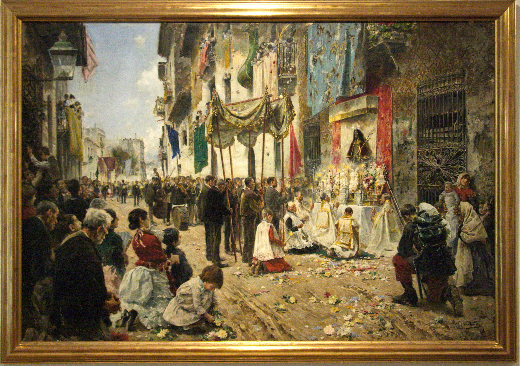 "Processó de Corpus a Sitges",1887, obra d'Arcadi Mas i Fontdevila al Museu Maricel de Sitges